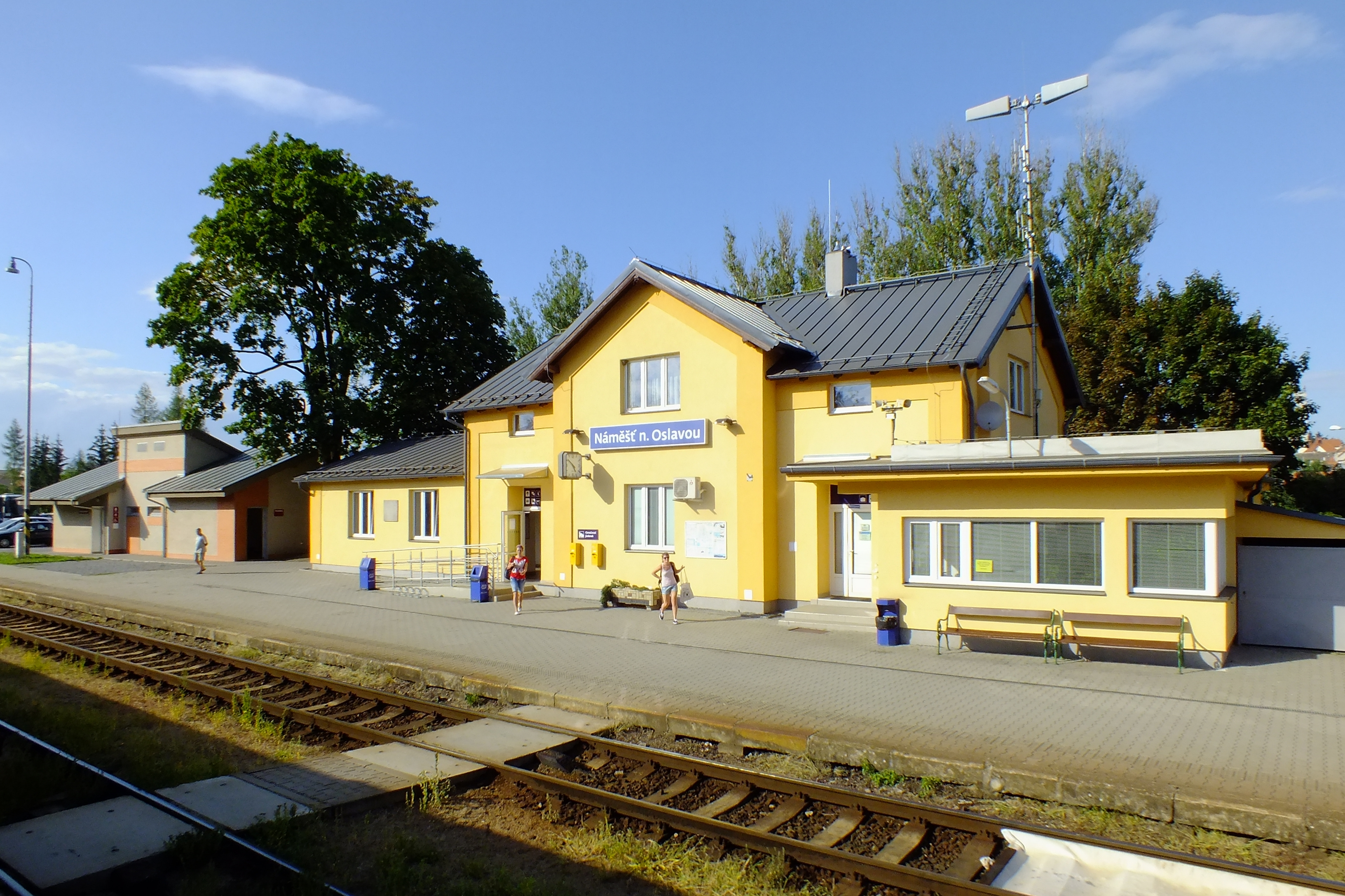 Staniční budova